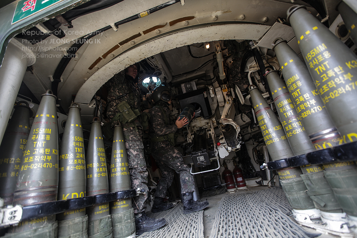 촬영 : 정승익